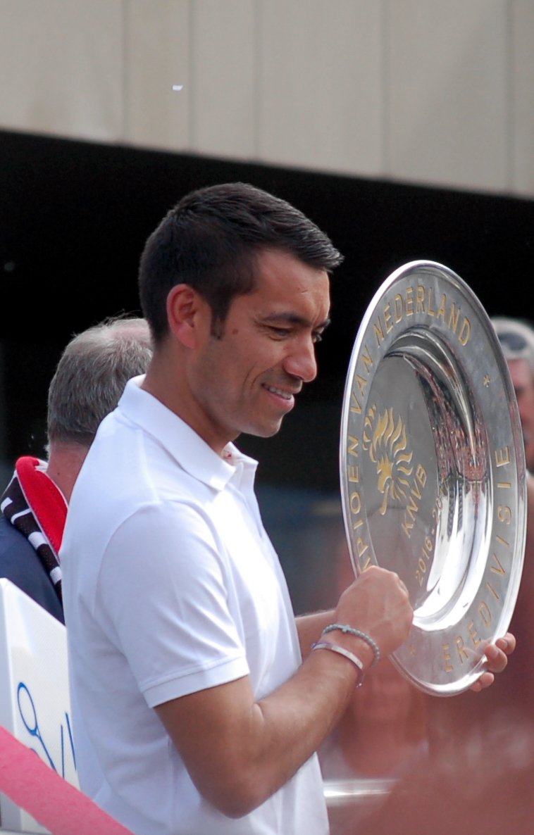 Huldiging Feyenoord-coach Giovanni van Bronckhorst in Krimpen aan den IJssel.